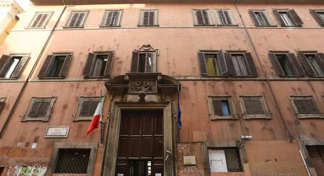 Facciata del Liceo Virgilio